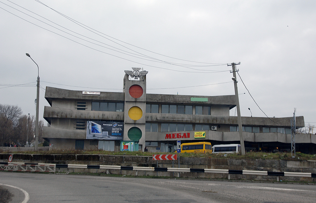 Васильевка автовокзал